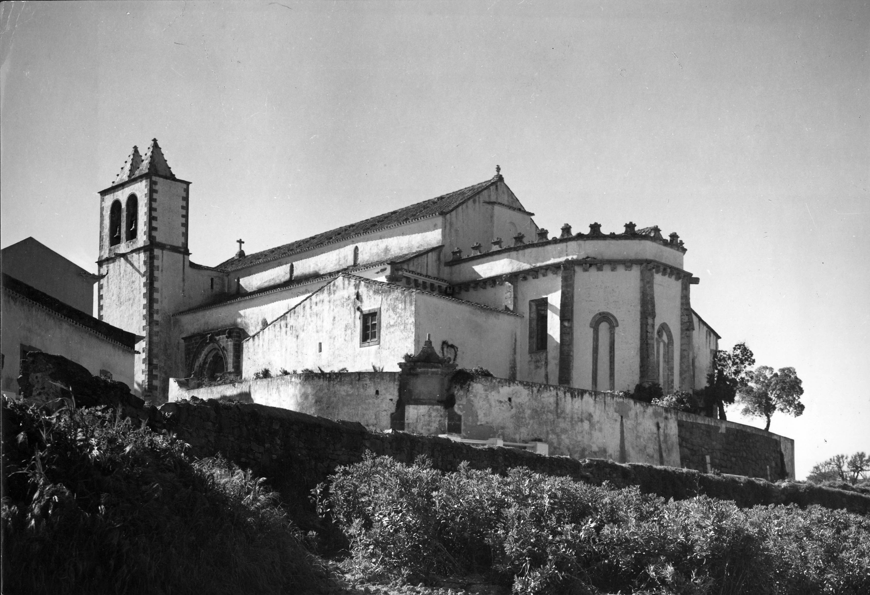 Fachada lateral sul e cabeceira. Fotógrafo: Mário Novais, 1899-1967. Orientador científico: Mário Tavares Chicó, 1905-1966. Data aproximada da produção da fotografia original: 1954. [CFT015.193.ic]